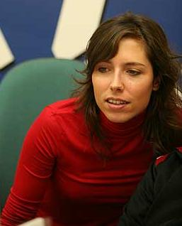 Marta Nebot en la redacción de 20 Minutos.